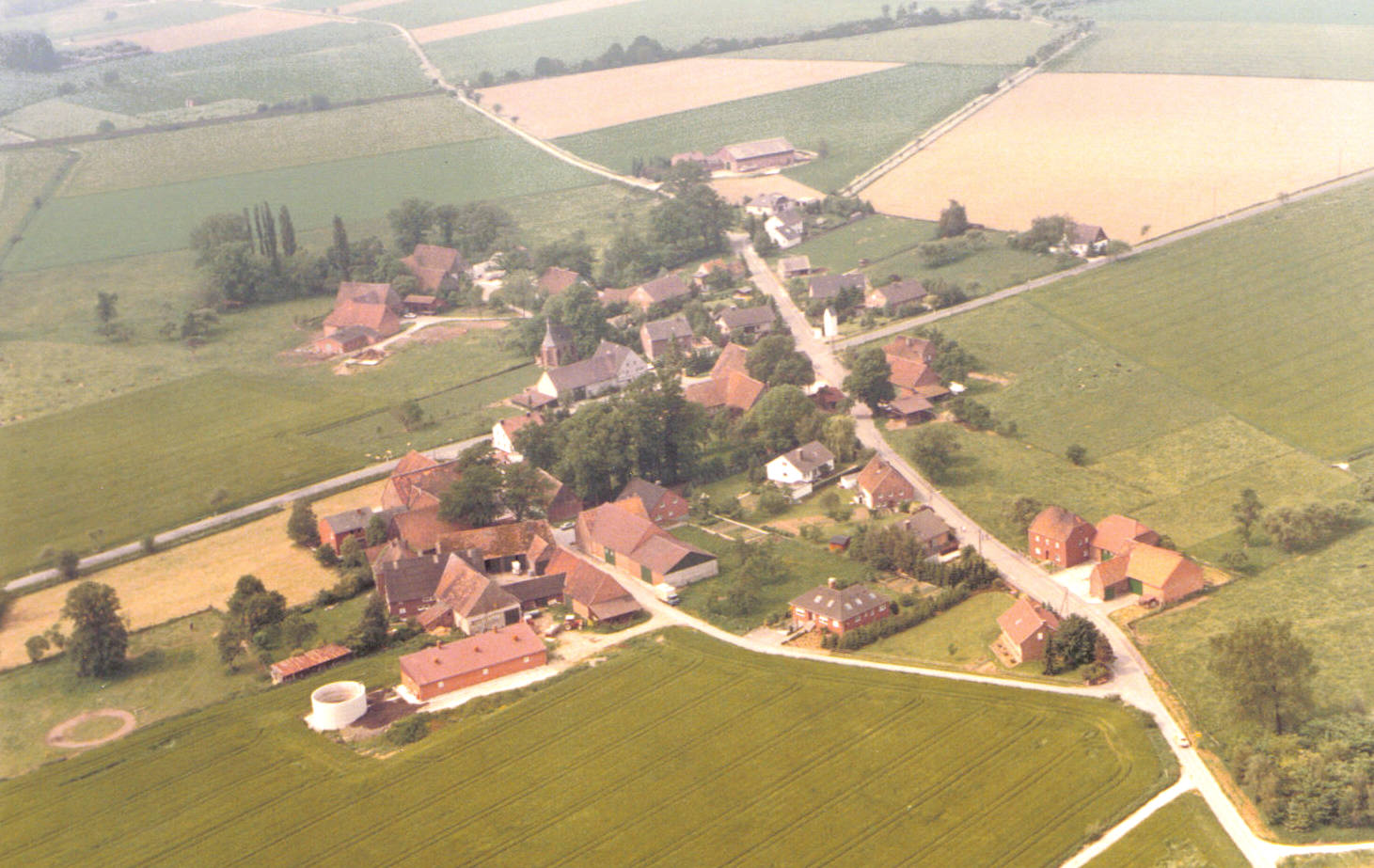 Luftaufnahme des Ortes Bönninghausen der Stadt Geseke um 1985